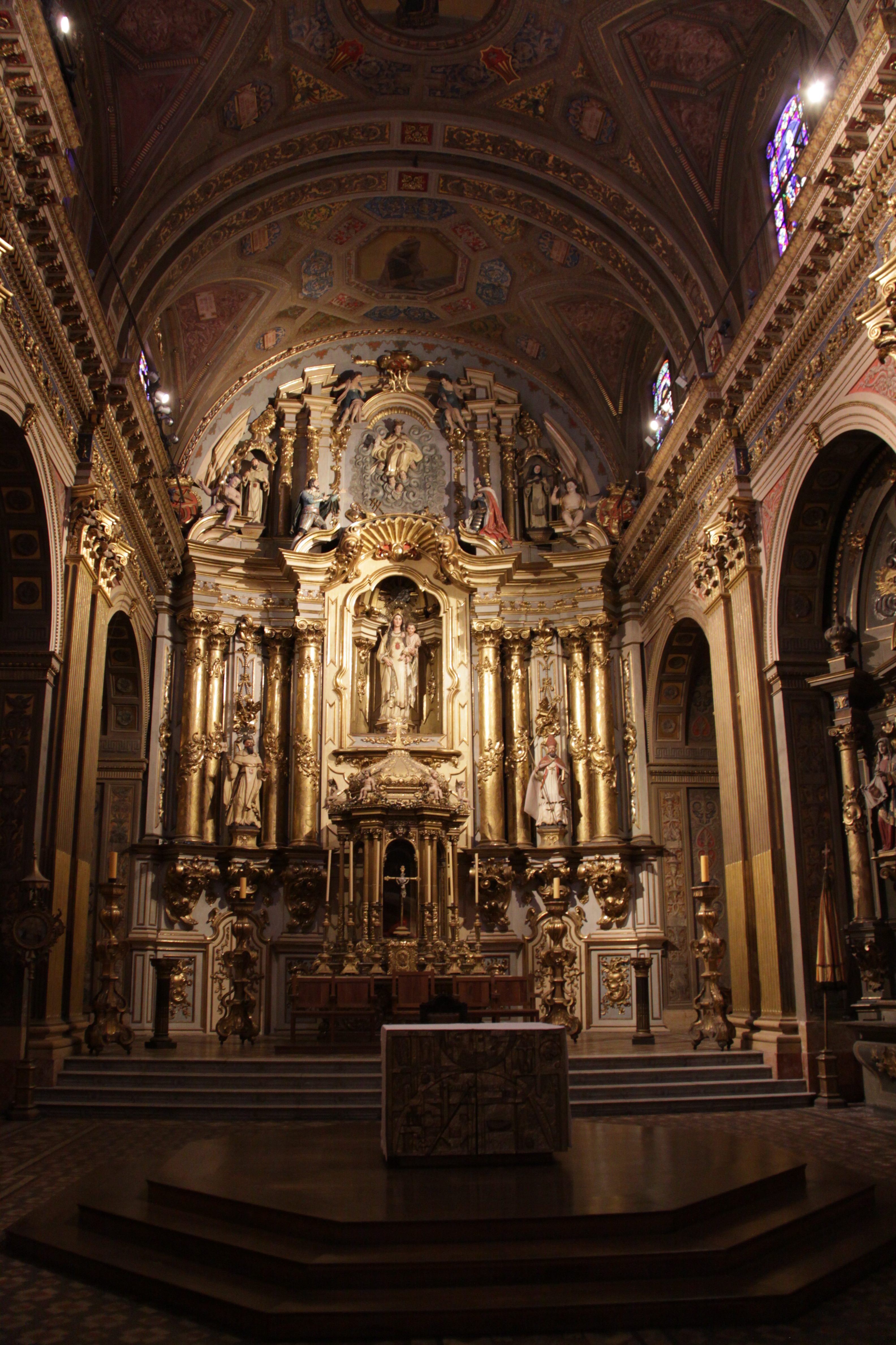 Vista del altar de la Basílica Nuestra Señora de la Merced en Buenos Aires.